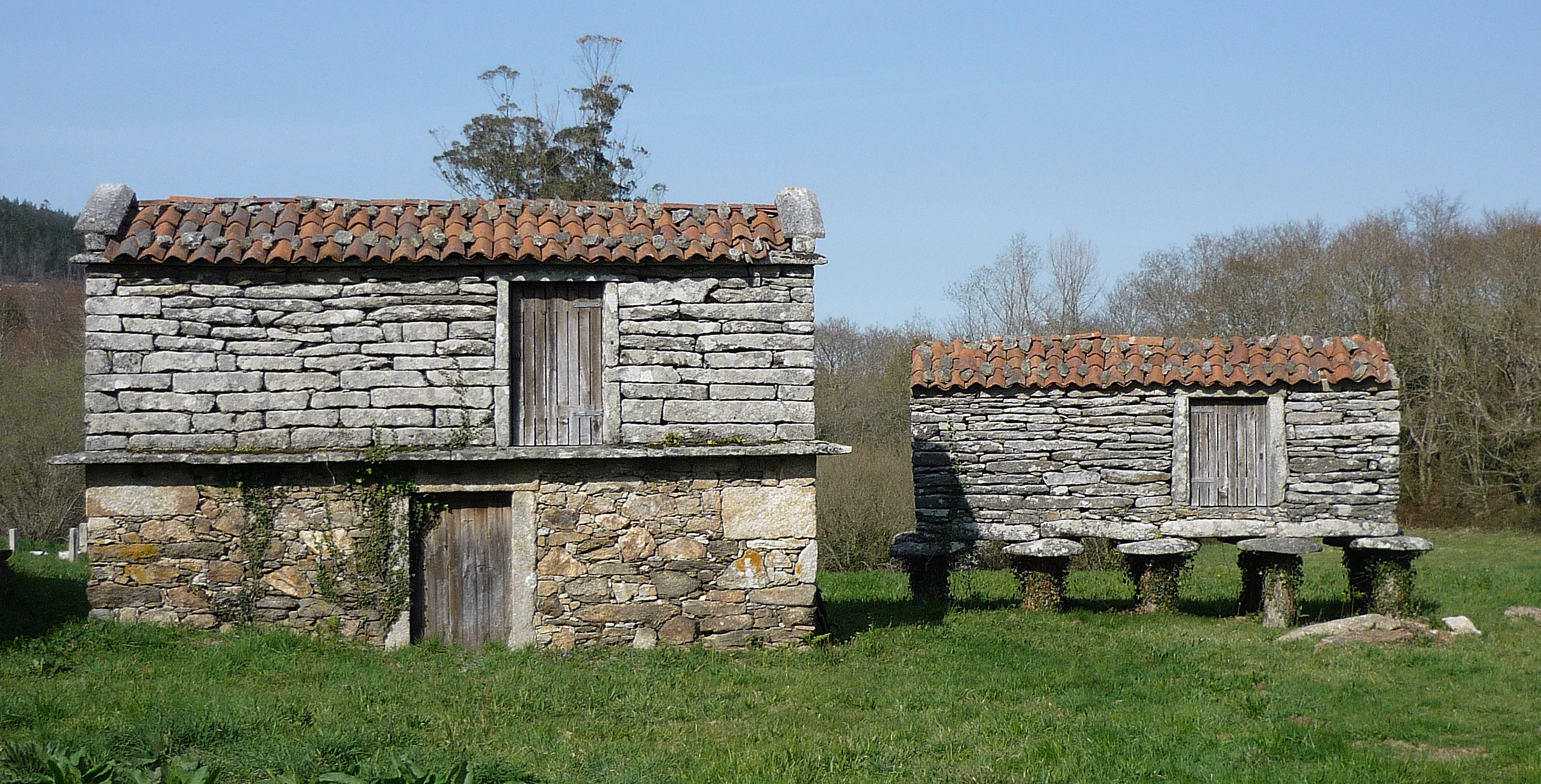 Hórreos das Torres do Allo, Zas